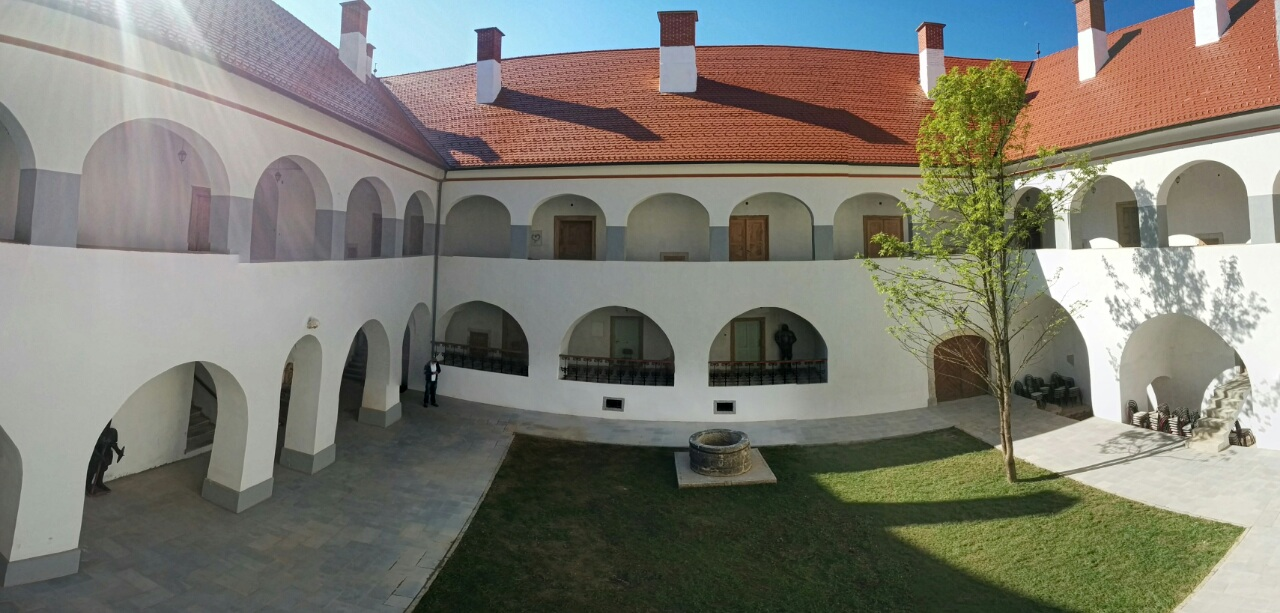 Atrij gradu Raka